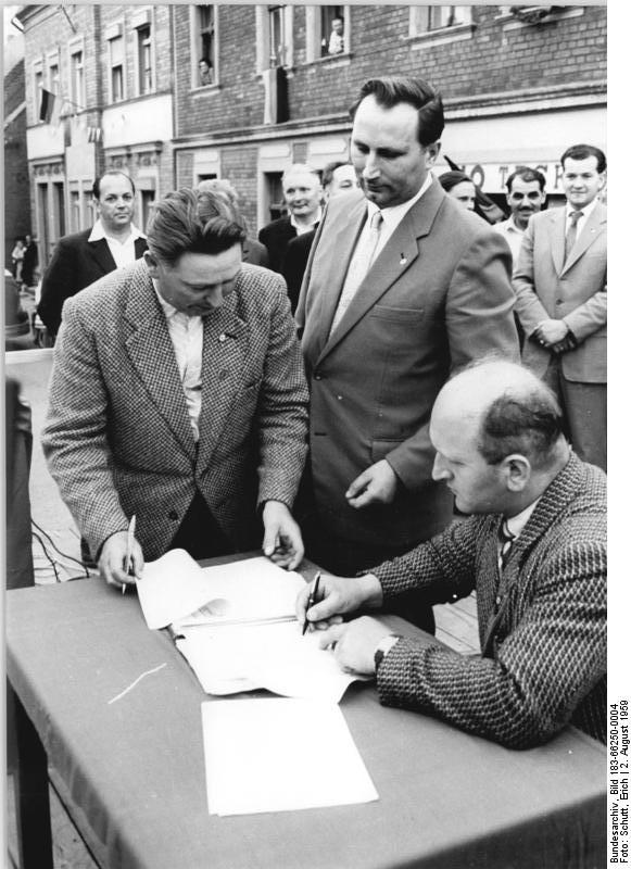 Elster, Festakt, Zusammenschluss MTS mit LPG Zentralbild Schutt Nl-L2.8.1959 Elster feierte sozialistische Hochzeit-Der 31. Juli war für die Traktoristen, Genossenschaftsbauern und die anderen Einwohner von Elster (Krs. Cottbus) ein ganz besonderer Tag. Sie feierten Hochzeit zwischen der Brigade 6 der MTS Mark-Zwunschen und der LPG ""Einheit"" vom Typ III in Elster. Ganz Elster, Bäuerinnen und Bauern aus zahlreichen Gemeinden des Kreises Jessen sowie Ehrengäste waren dabei. UBz: MTS-Direktor Woik und der LPG-Vorsitzende Schumacher (vorn sitzend) unterzeichnen den Leihvertrag.